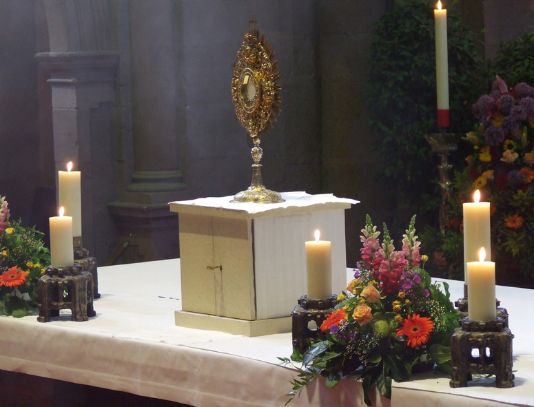 Mainzer Segen